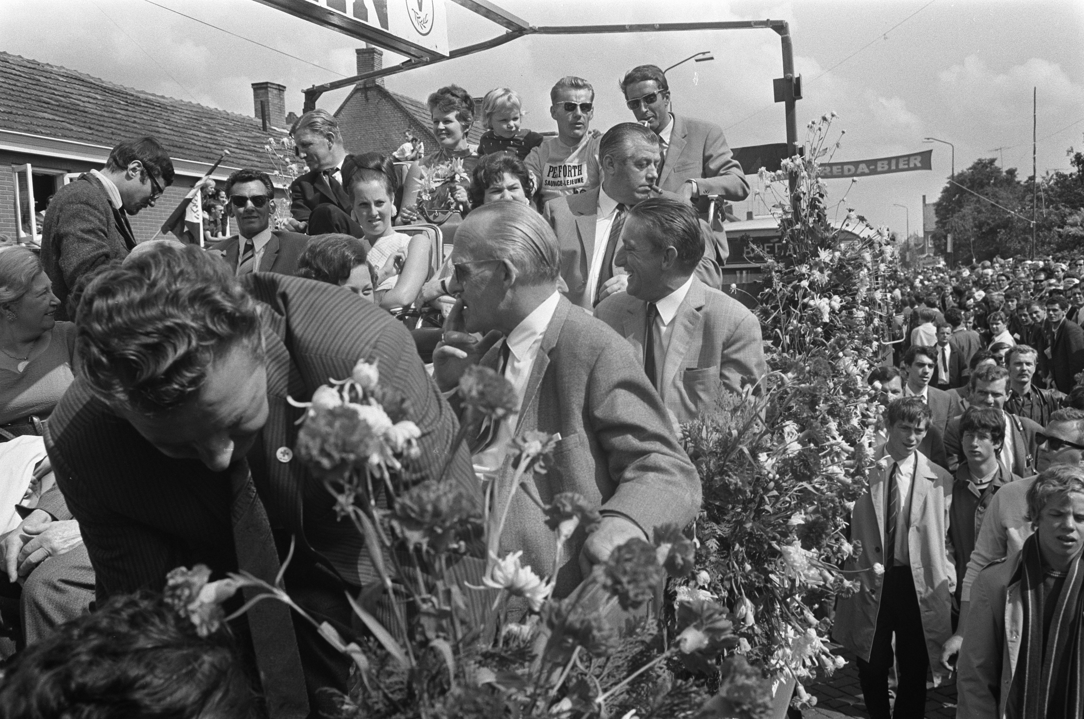 Collectie / Archief : Fotocollectie Anefo Reportage / Serie : [ onbekend ] Beschrijving : Acht van Chaam. Huldiging Jan Janssen vooraf. Jan Janssen op wagen Datum : 24 juli 1968 Locatie : Chaam Trefwoorden : huldigingen, wagens, wielrenners Fotograaf : Koch, Eric / Anefo Auteursrechthebbende : Nationaal Archief Materiaalsoort : Negatief (zwart/wit) Nummer archiefinventaris : bekijk toegang 2.24.01.05 Bestanddeelnummer : 921-5320